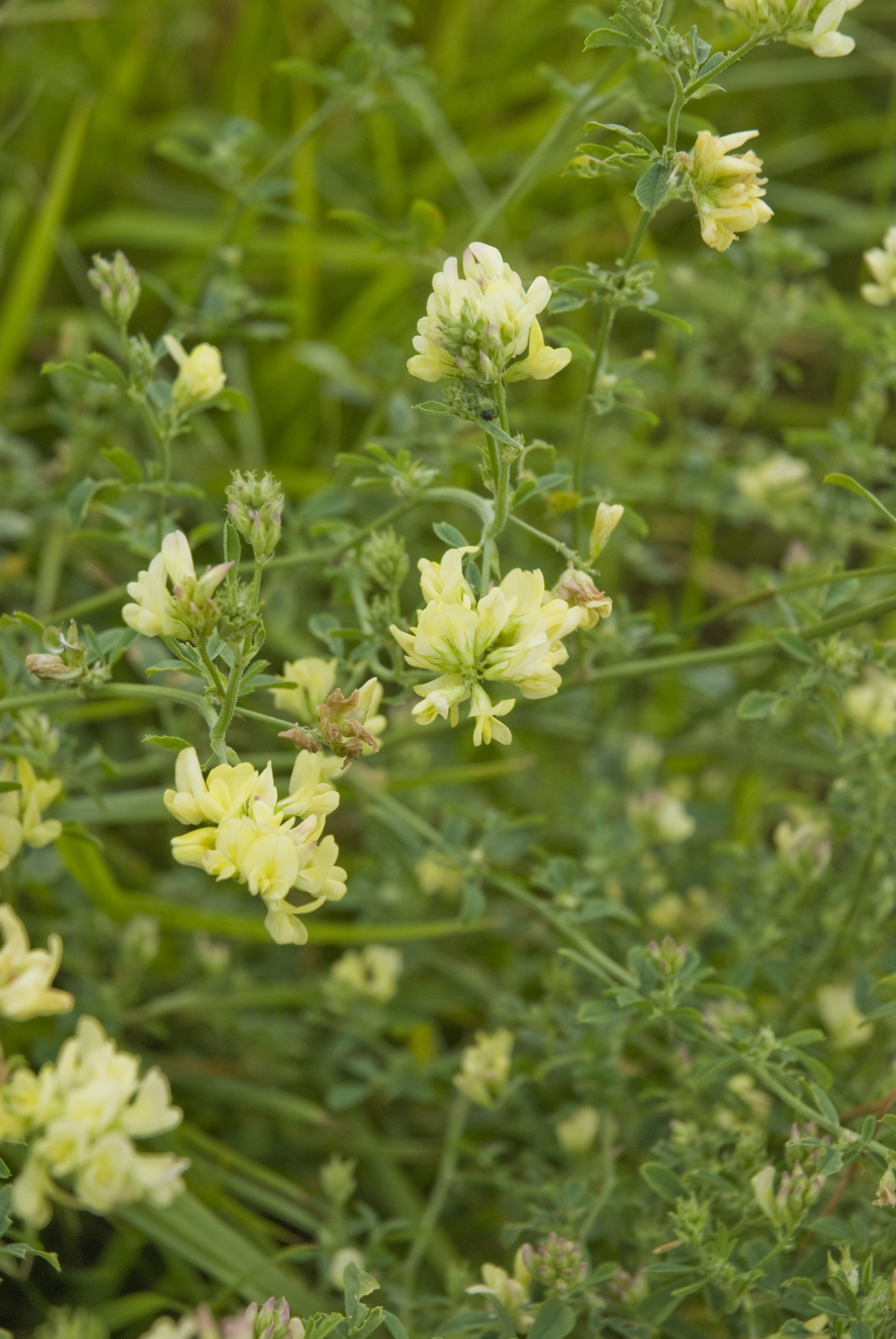 Medicago sativa Velennes (Somme), France